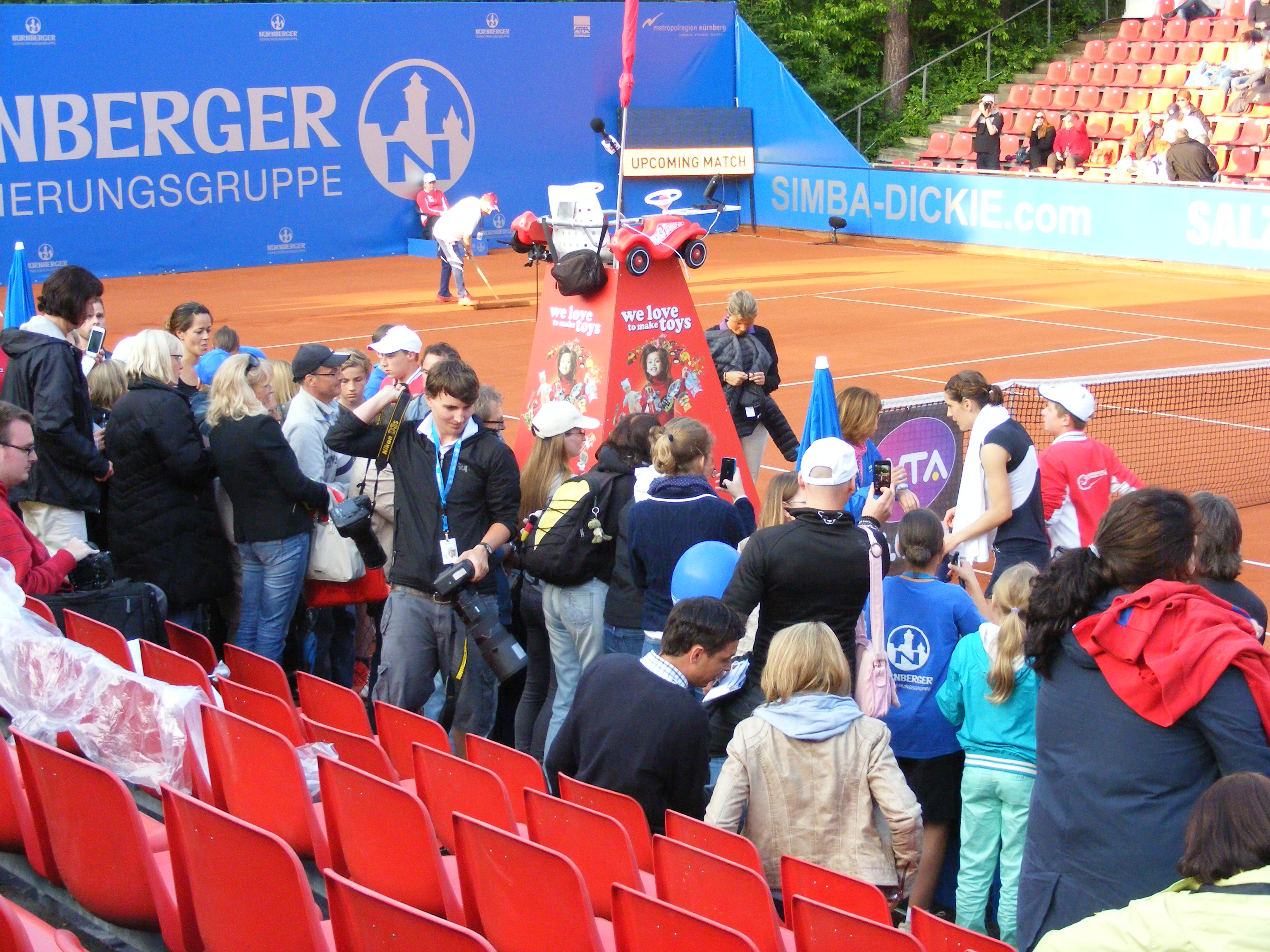 Zwischen zwei Matches beim WTA World Tour International Turnier "Nürnberger Versicherungscup 2013" mit Andrea Petkovic beim Autogrammschreiben